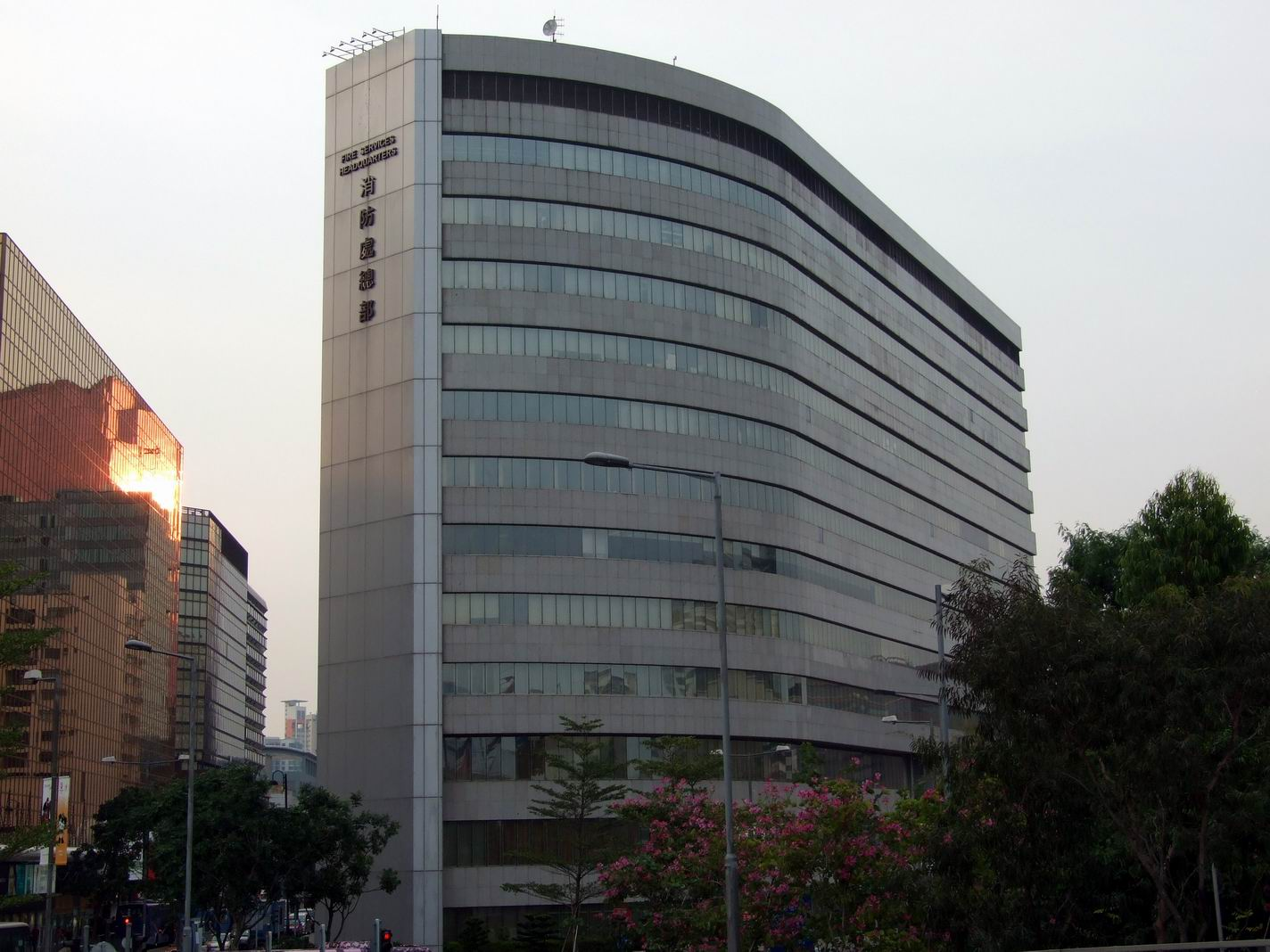 香港消防處總部大廈